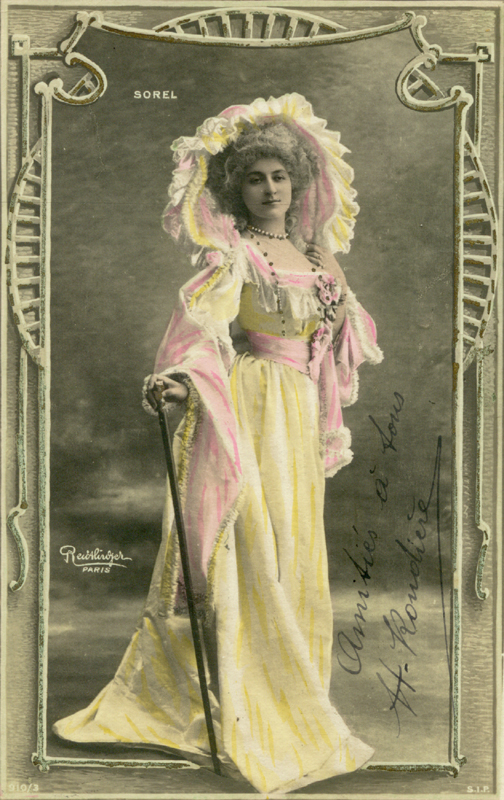 Cecile Sorel